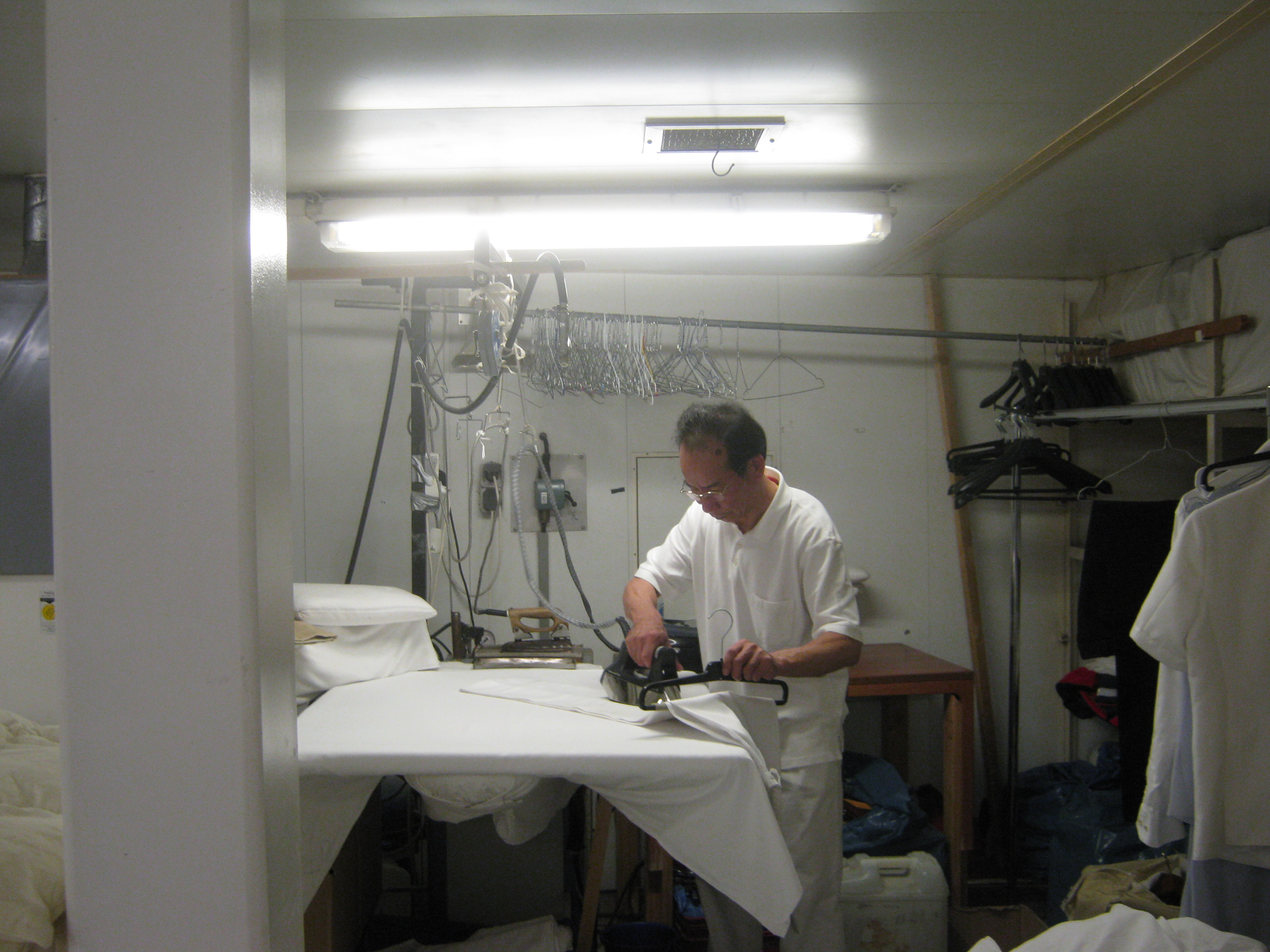 Chinesischer Wäscher beim Bügeln auf MS Deutschland